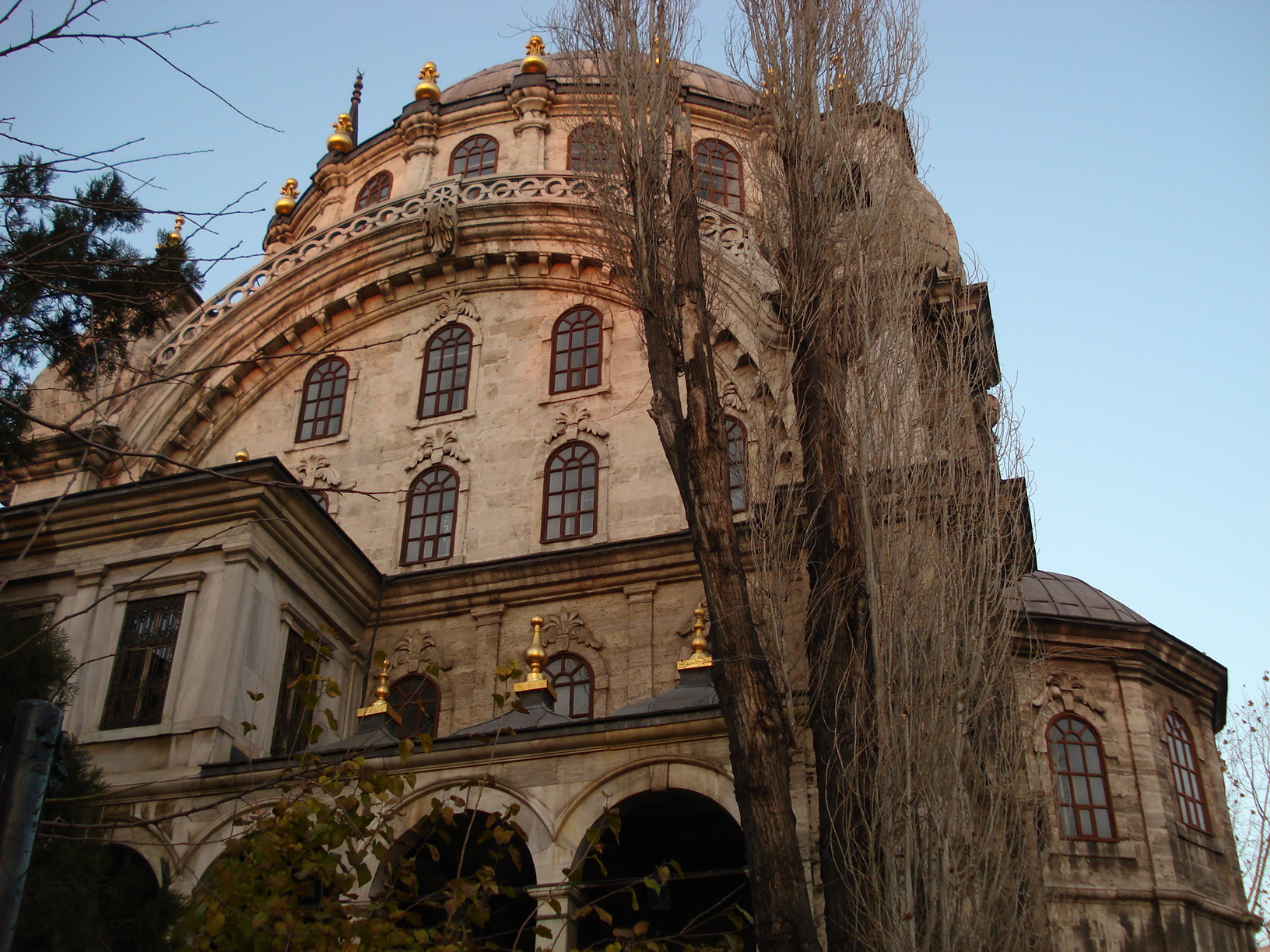 Nusretiye Mosque in İstanbul.